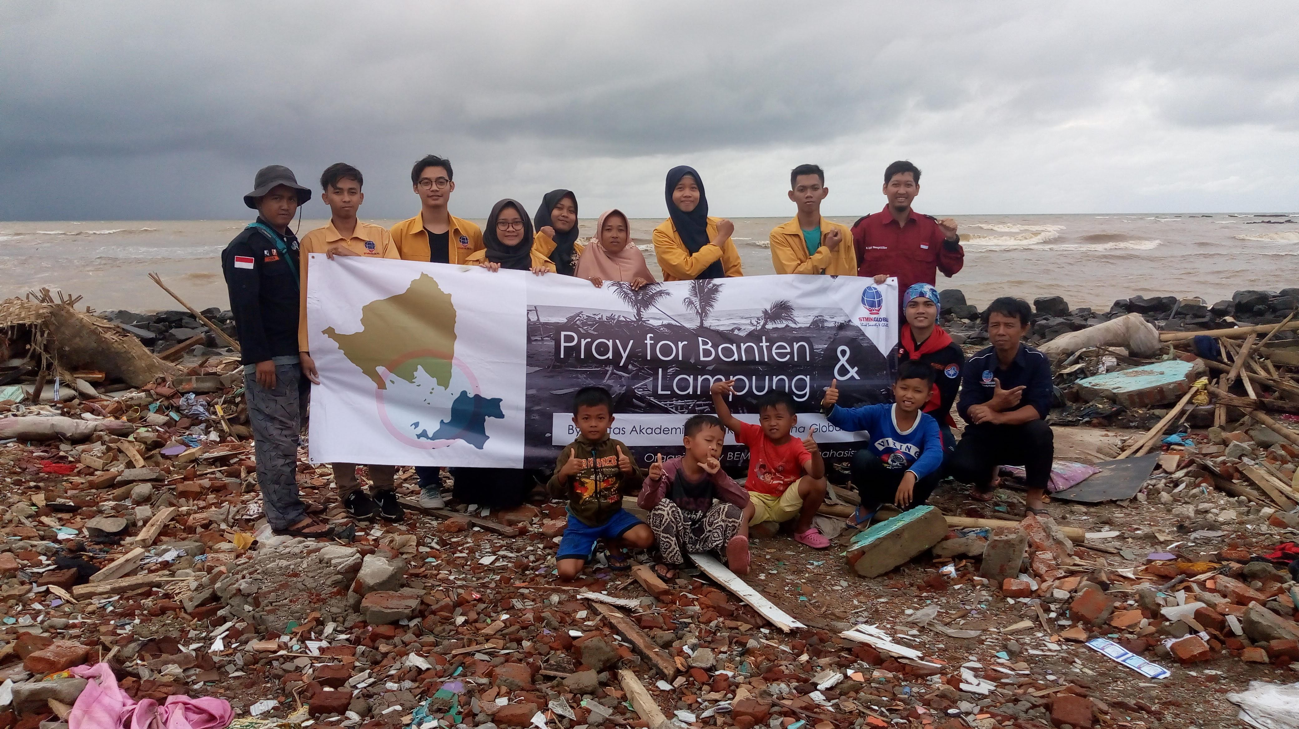 STMIK Bina Sarana Global Pray for Banten